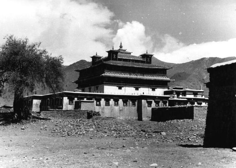 Samyeh, Kloster